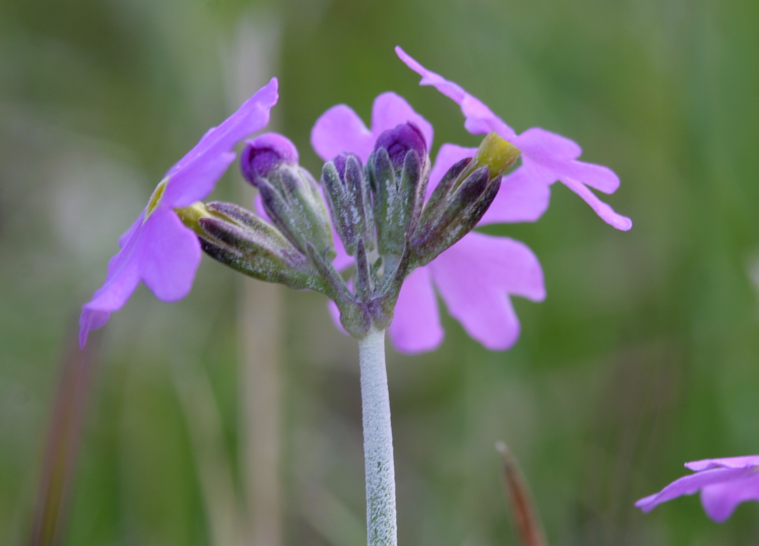 Primula_farinosa (Primula farinosa) Località: Le Laste, Limana (BL), 661 m s.l.m.